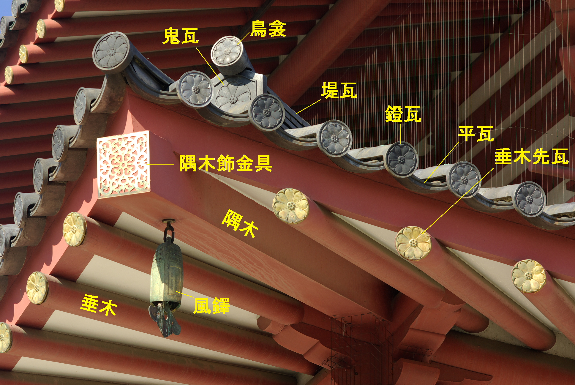 復元された四天王寺金堂にみる屋根の各構成部品。 図中の各部の名称は、 前場幸治『古瓦考（相模国分寺千代台廃寺）』冬青社(1993年) 溝口明則『法隆寺建築の設計技術』鹿島出版会（2012年） による。